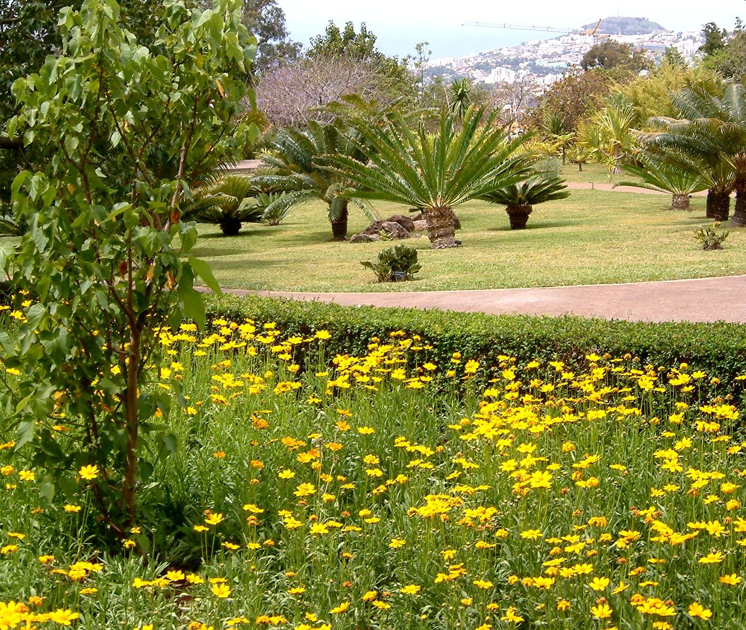 Madeira_oberhalb_funchal_botanischer_garten_5-07. Photograph: Peggy